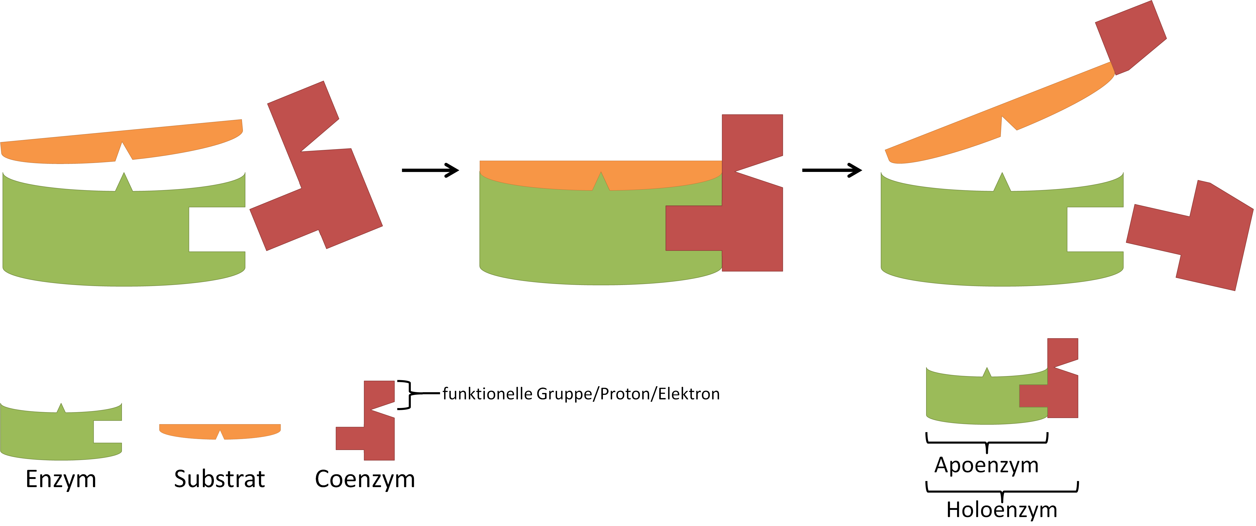 Schema der Arbeitsweise eines Coenzyms; Substrat und Coenzym binden non-kovalent an Enzym, das Coenzym nimmt vom Substrat eine funktionelle Gruppe/ein Proton/Elektron auf bzw. (wie im diesem Bild) gibt sie an das Substrat ab. Es geht also wie das Substrat verändert aus der Reaktion hervor und dissoziiert nach dieser wieder vom Enzym.